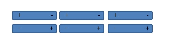 Orientazio indarrak